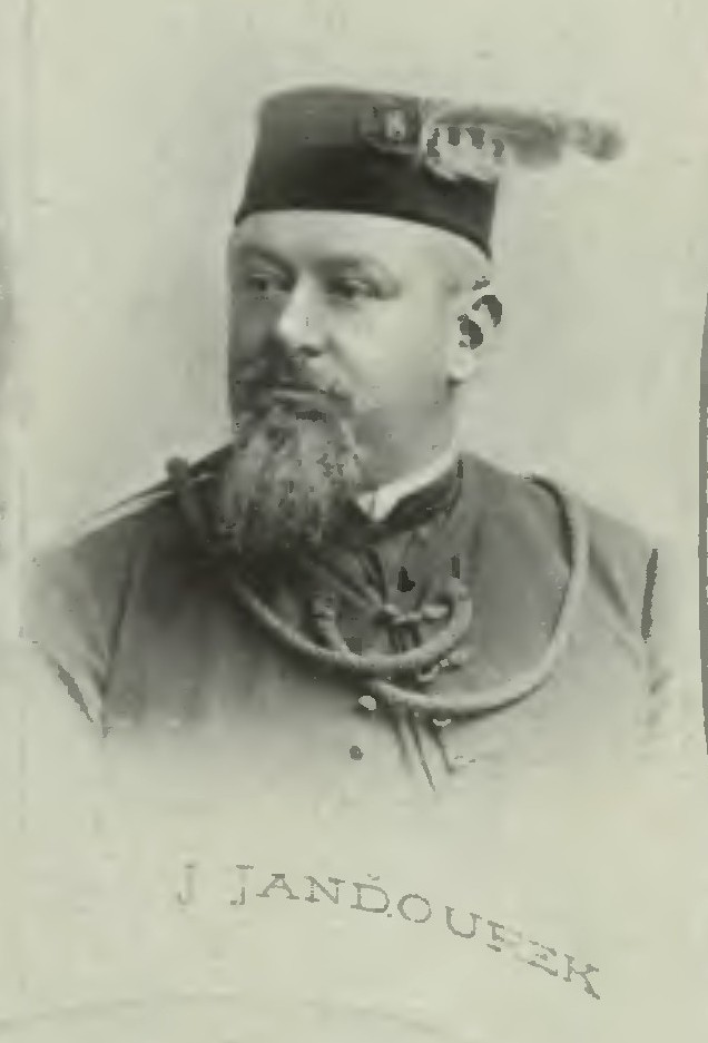 Portrét – Jan Janďourek (1849 - 1903), Český podnikatel a politik.